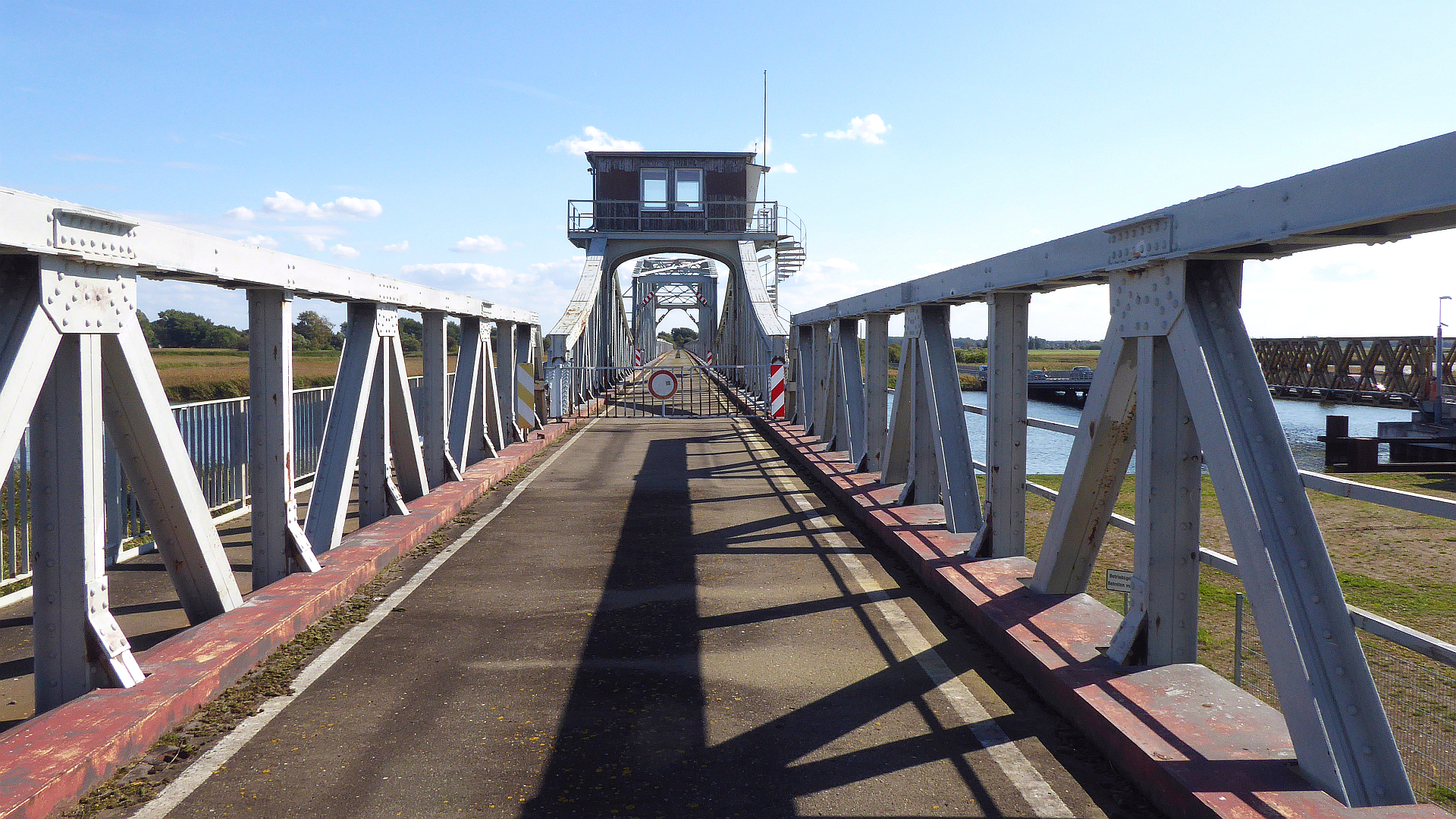 Meiningenbrücke aus dem Jahr 1912, eine Stahlfachwerkbrücke mit Drehbrücke über Meiningenstrom. Die Bauwerksgesamtlänge beträgt 470 m. Die für eine Eisenbahnstrecke errichtete Brücke wurde nach dem Krieg stillgelegt, in den 1960er Jahren als Straßenbrücke reaktiviert, bis ein westlich daneben liegendes Ersatz-Provisorium der Straßenführung gewidmet wurde - Foto Wolfgang Pehlemann P1260057